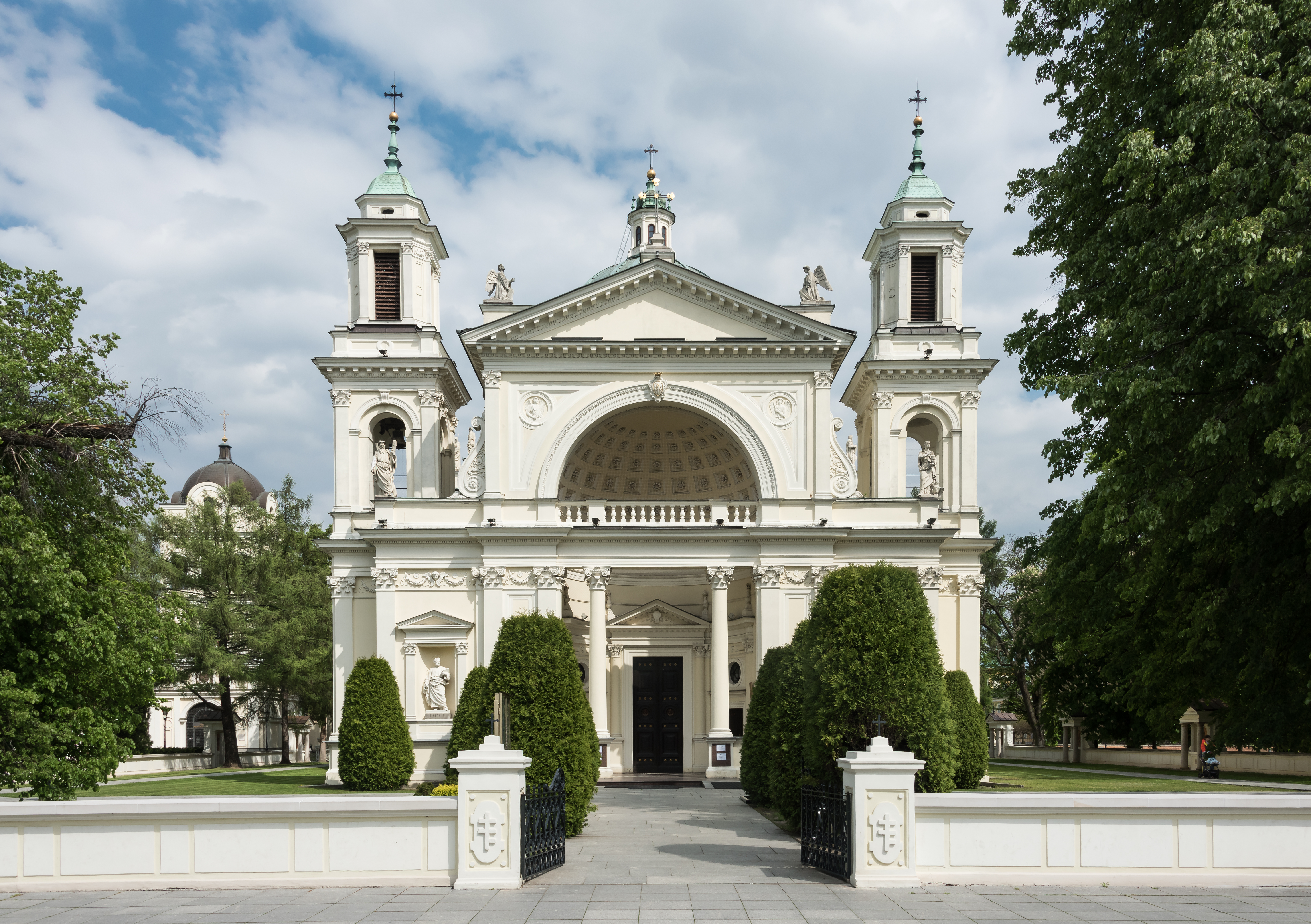 Kolegiata św. Anny w Wilanowie